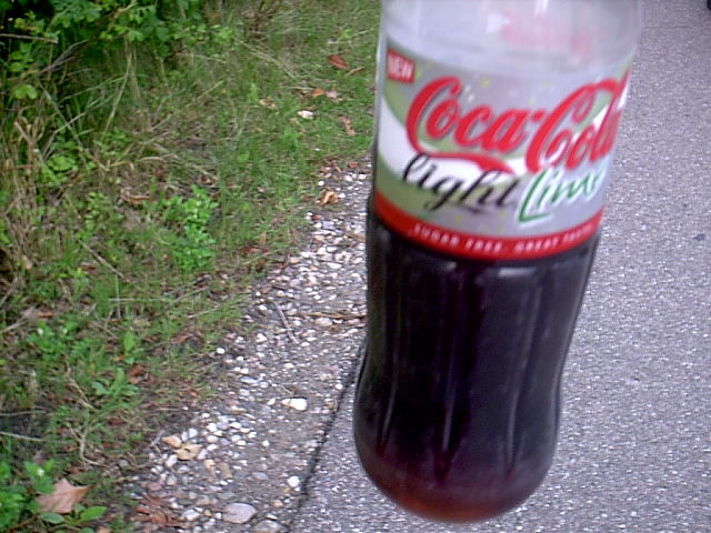 Cocacola Light Lime.